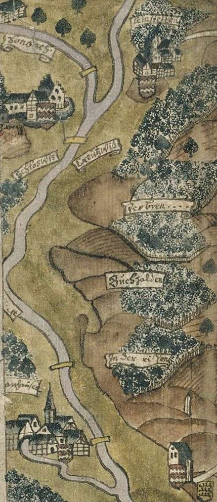 Leinstetten mit Schloss und Burg Lichtenfels